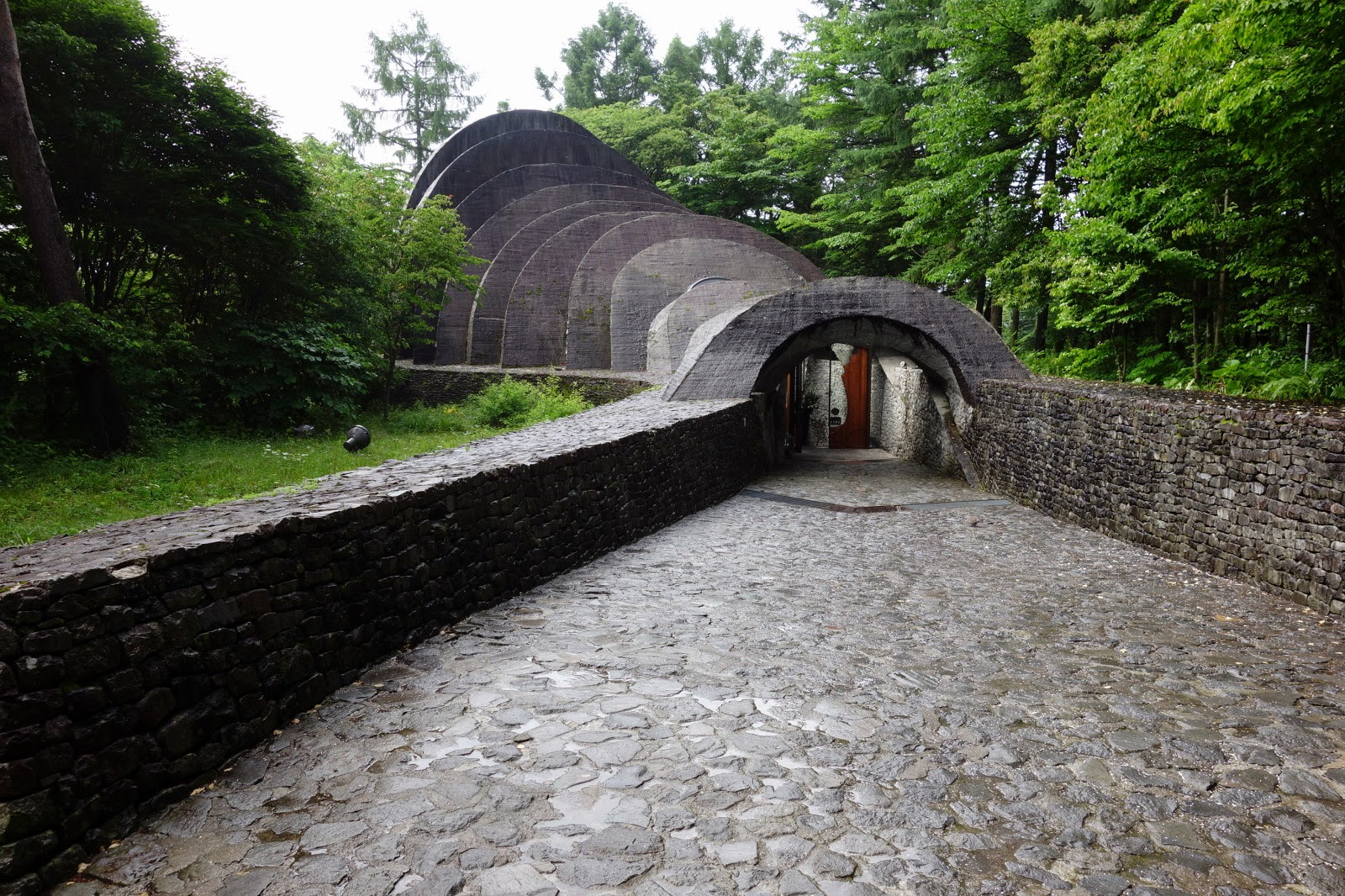 石の教会・内村鑑三記念堂,長野県軽井沢町